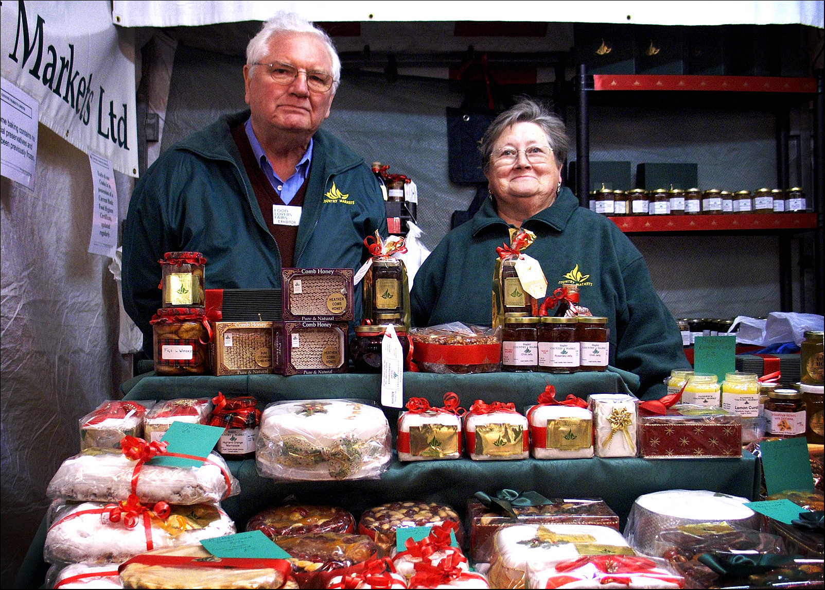 런던의 과자 가게.